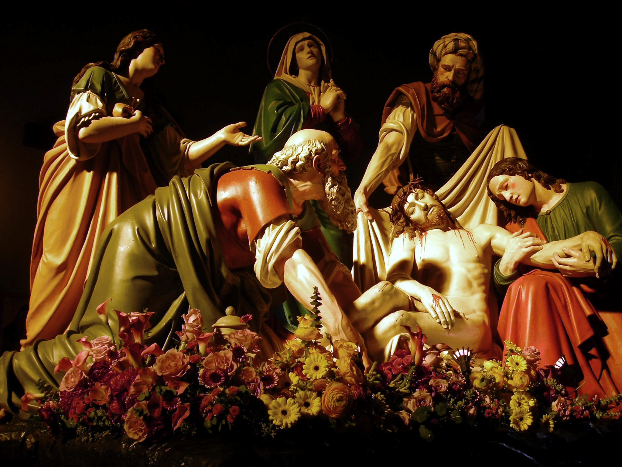 La deposizione nel Sepolcro, Antonio Brilla 1866